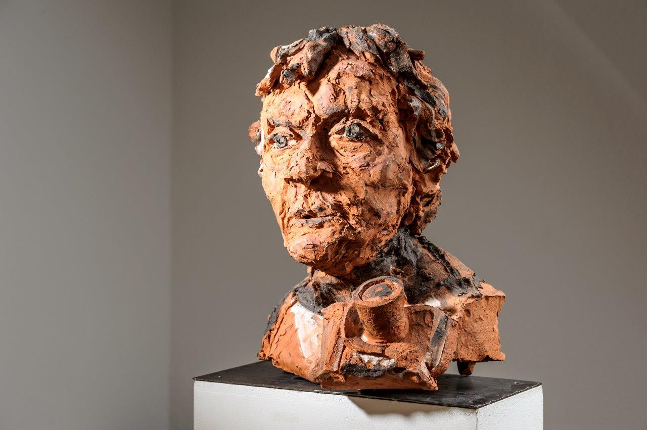 Büste Karin Powser von Harald Birk (2005), Foto von Klaus G. Kohn (2016)